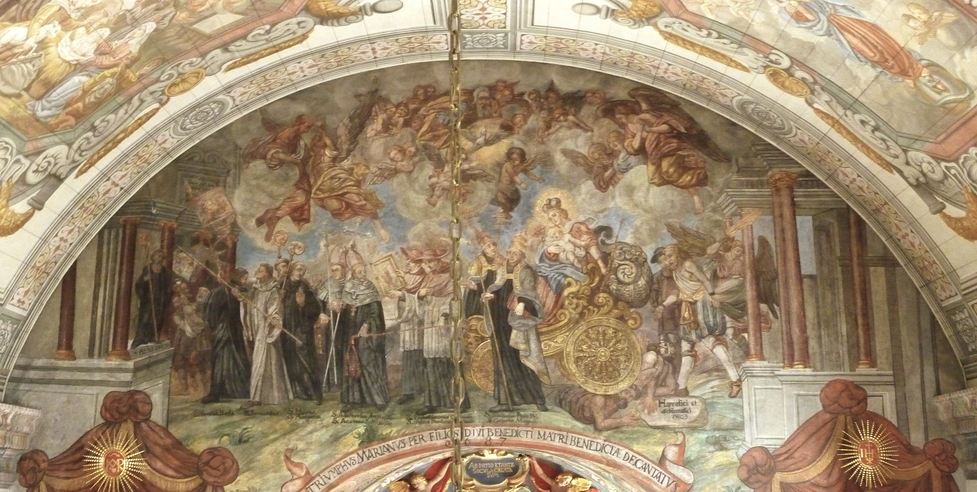 Wallfahrtskirche Maria Licht Triumphzug Mariens an der Chorbogenwand